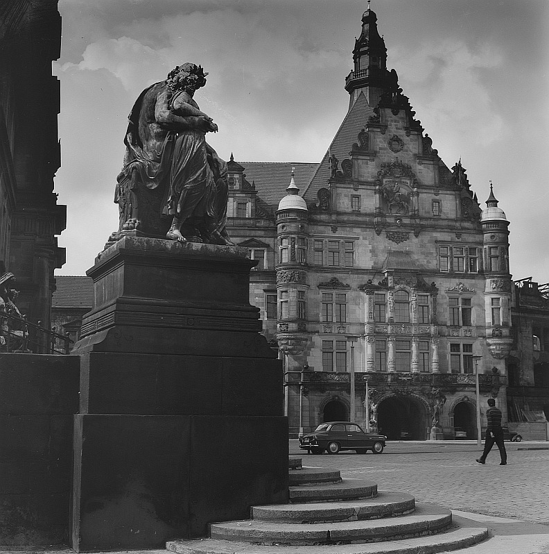 Original image description from the Deutsche FotothekDresden. Blick zum Georgentor